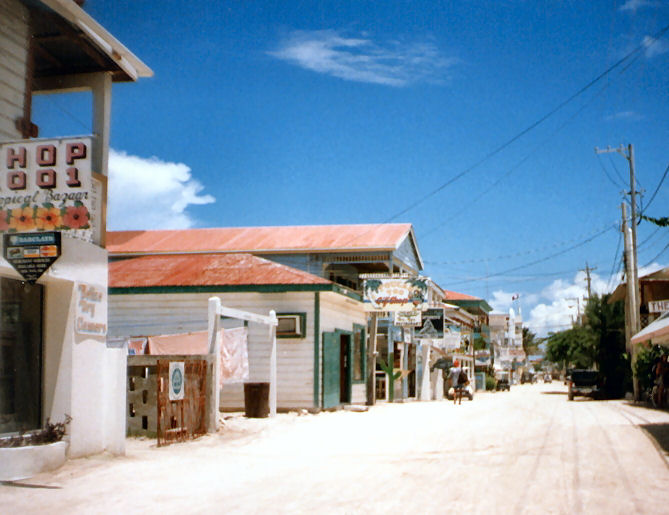 San Pedro (Belize) on Ambergris Caye